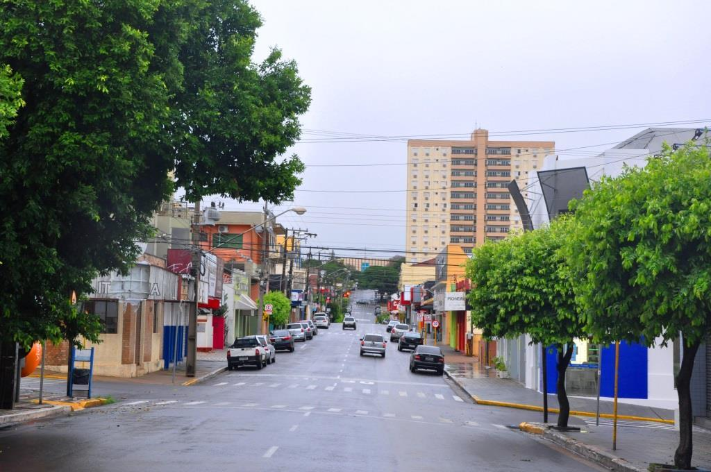 Centro de Presidente Venceslau